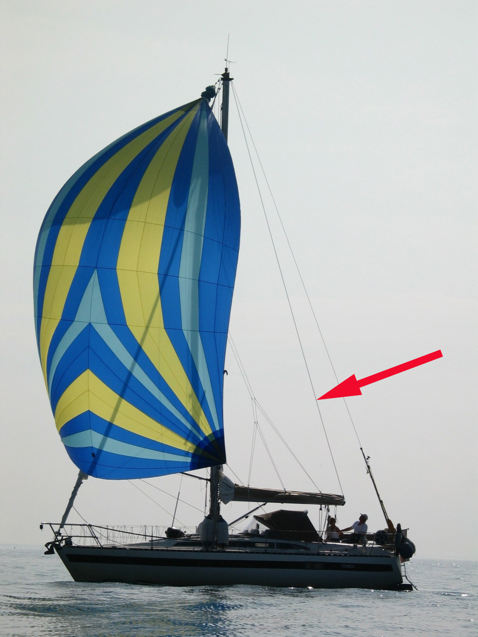 Dirk